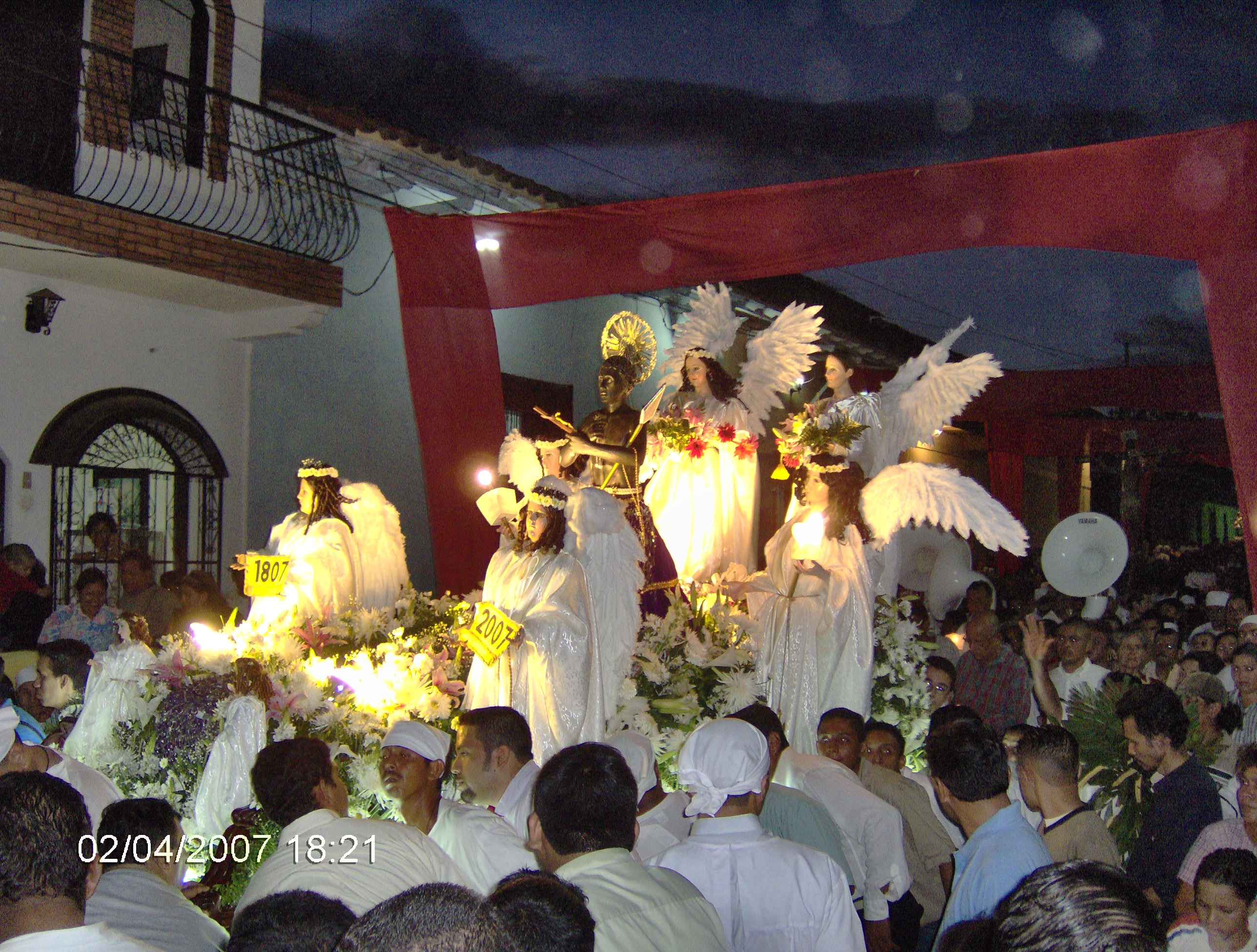 San Benito de Palermo. Devoción que data en nuestra ciudad desde el año 1807. Lunes Santo. Iglesia San Francisco de Asís. León, Nicaragua.